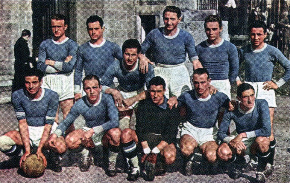 A line-up of S.S. Lazio in the 1940–41 season. From left to right, standing: Zironi, V. Dagianti, I. Romagnoli (bowed), S. Piola, A. Ferri, A. Puccinelli; crouched: S. Gualtieri, R. Ferrarese, U. Gradella, A. Monza, E. Flamini.